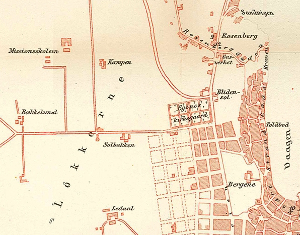 Kart over Stavanger, 1889